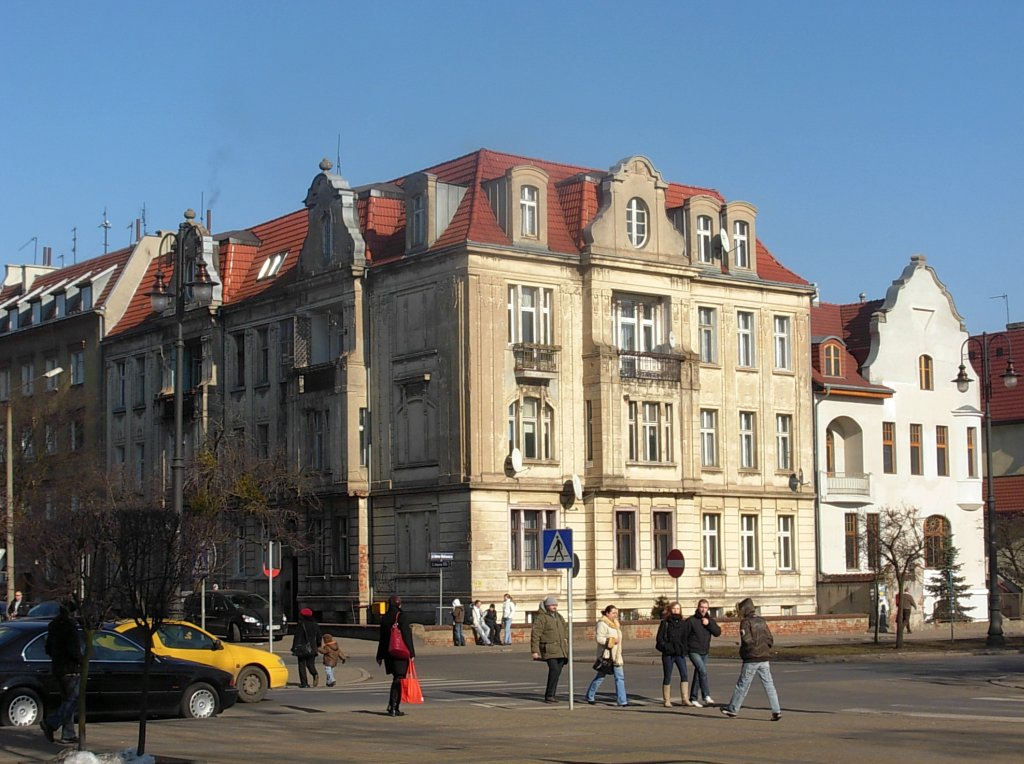 Budynki na rogu al. Adama Mickiewicza i ul. 20 I 1920 r. w Bydgoszczy